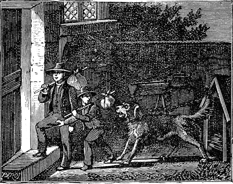 Illustration of Le Tour de la France par deux enfants, by G. Bruno (1833-1923)